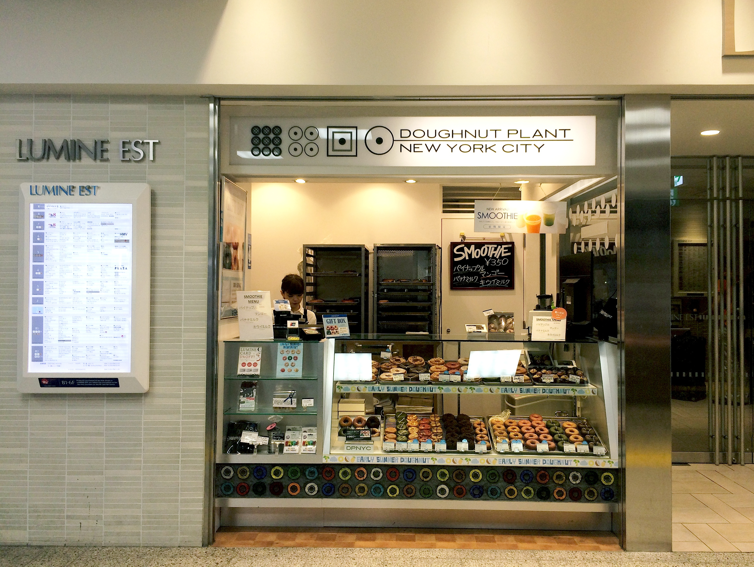 ドーナッツプラント ルミネエスト店 東京都新宿区新宿3